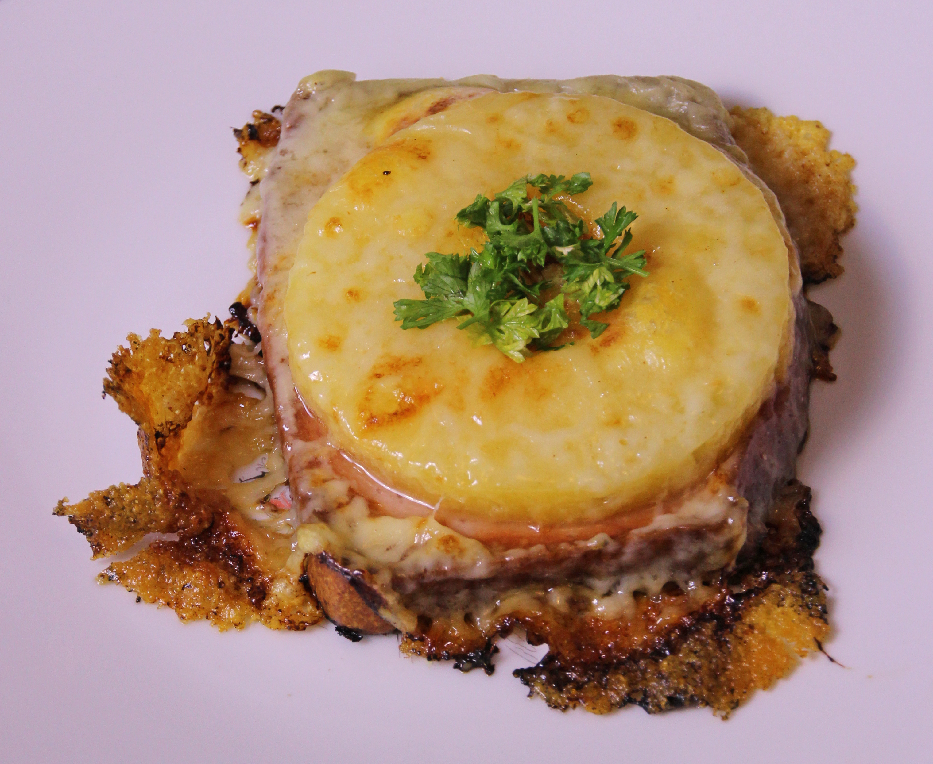 Bildinhalt: Leberkäse Hawaii. Von unten nach oben: Weißer Teller, Leberkäse, Ananasring aus der Dose, Käsescheibe, Petersilie. Leberkäse, Ananas und Käse sind geröstet. Aufnahmeort: Frankfurt am Main, Deutschland